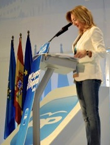 Intervención politica del PP